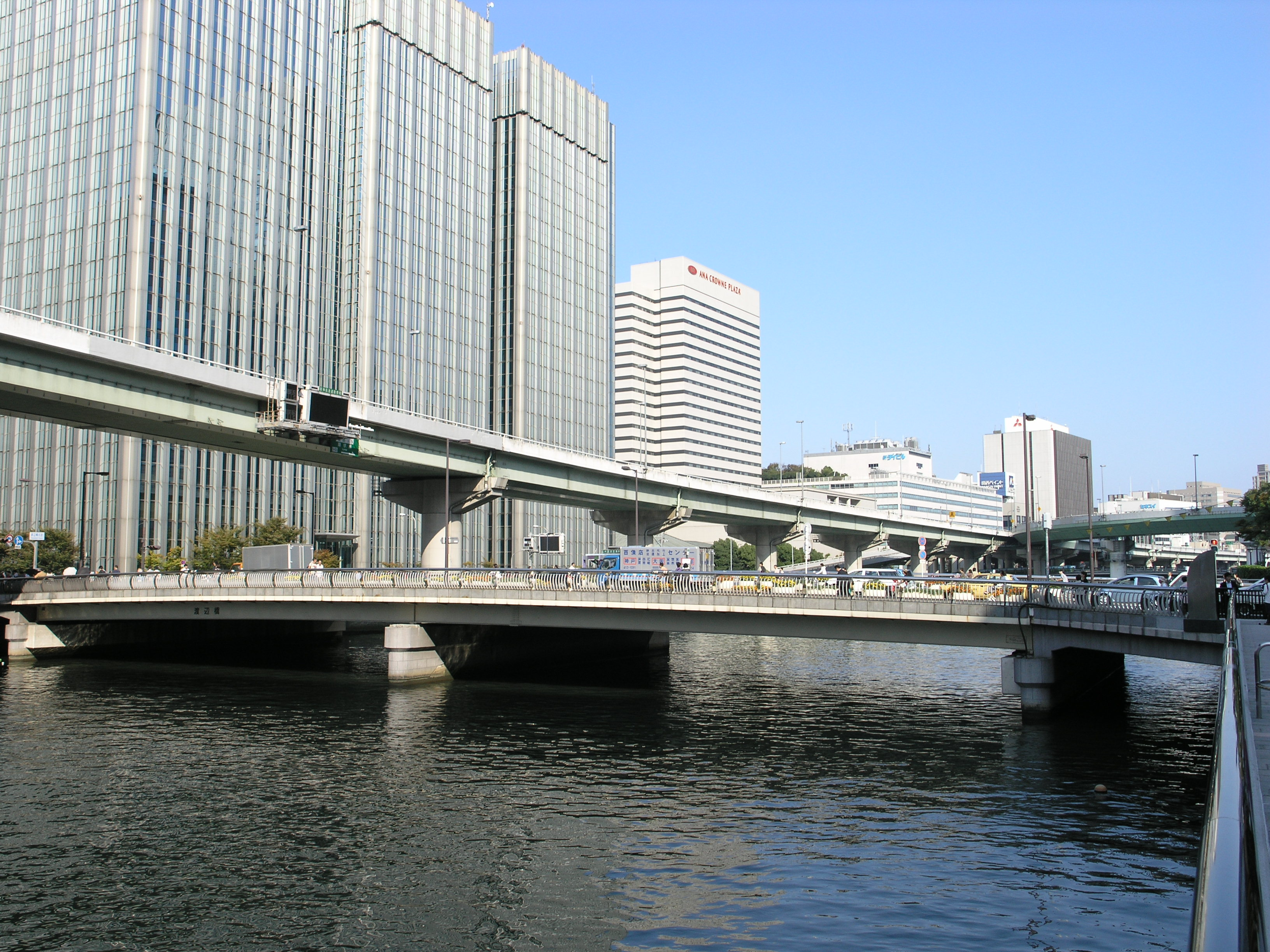 渡辺橋（大阪市北区） 2008年10月撮影。 機材：C8080WZ 撮影者：Kansai explorer